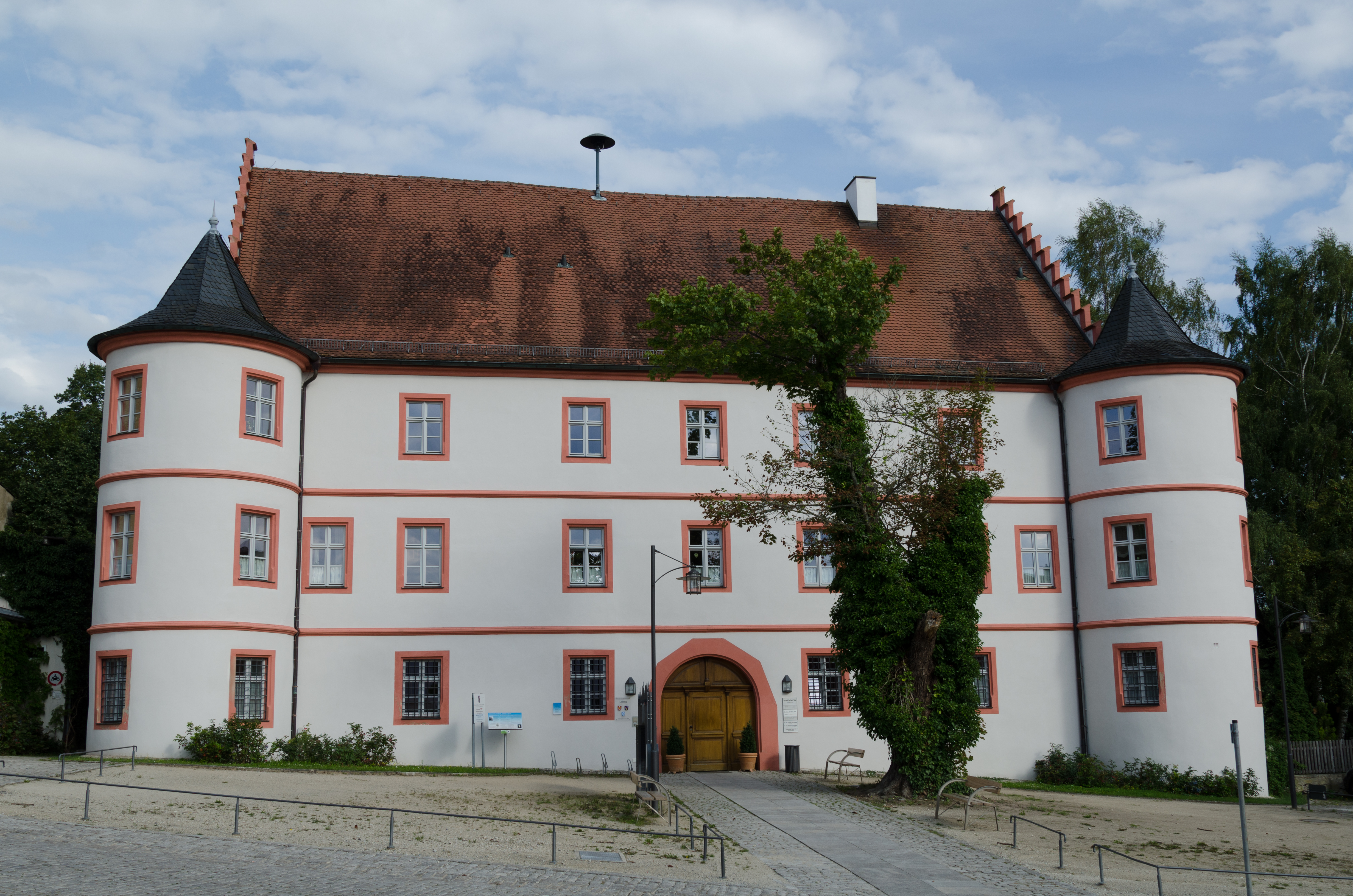 Lisberg, Trabelsdorfer Schloss